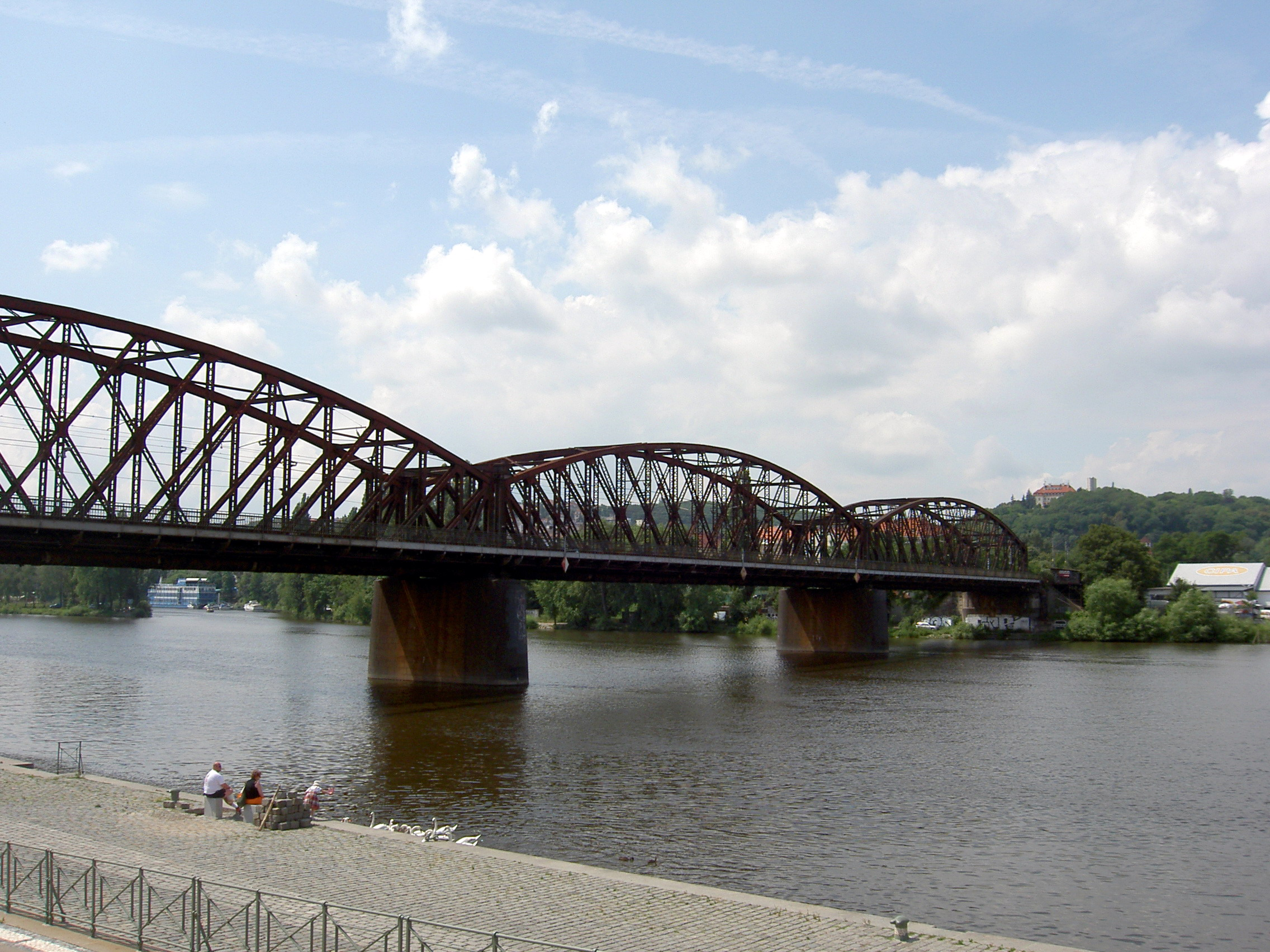 Vyšehradský železniční most